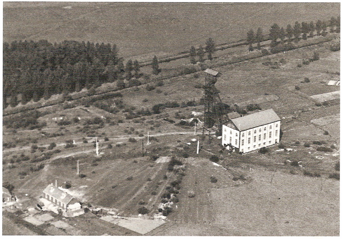 La fosse Saint-Aybert de la Compagnie des mines de Thivencelle était un charbonnage constitué d'un seul puits situé à Thivencelle, Nord, Nord-Pas-de-Calais, France.